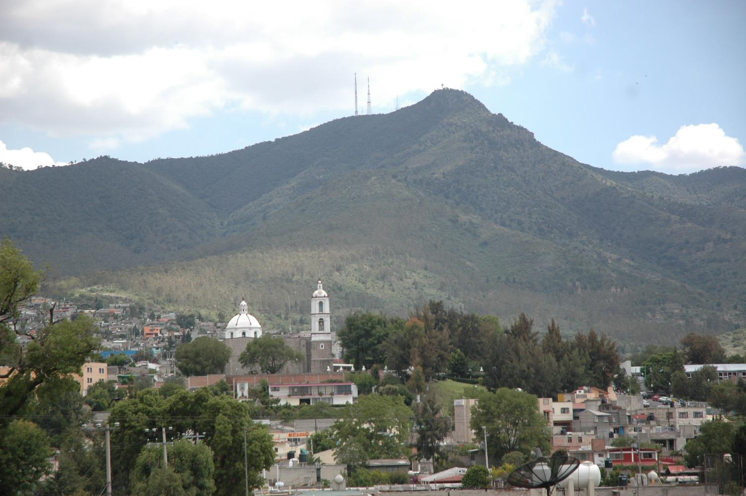 Parroquia de San Francisco de Asís de fondo la Sierra de Guadalupe.